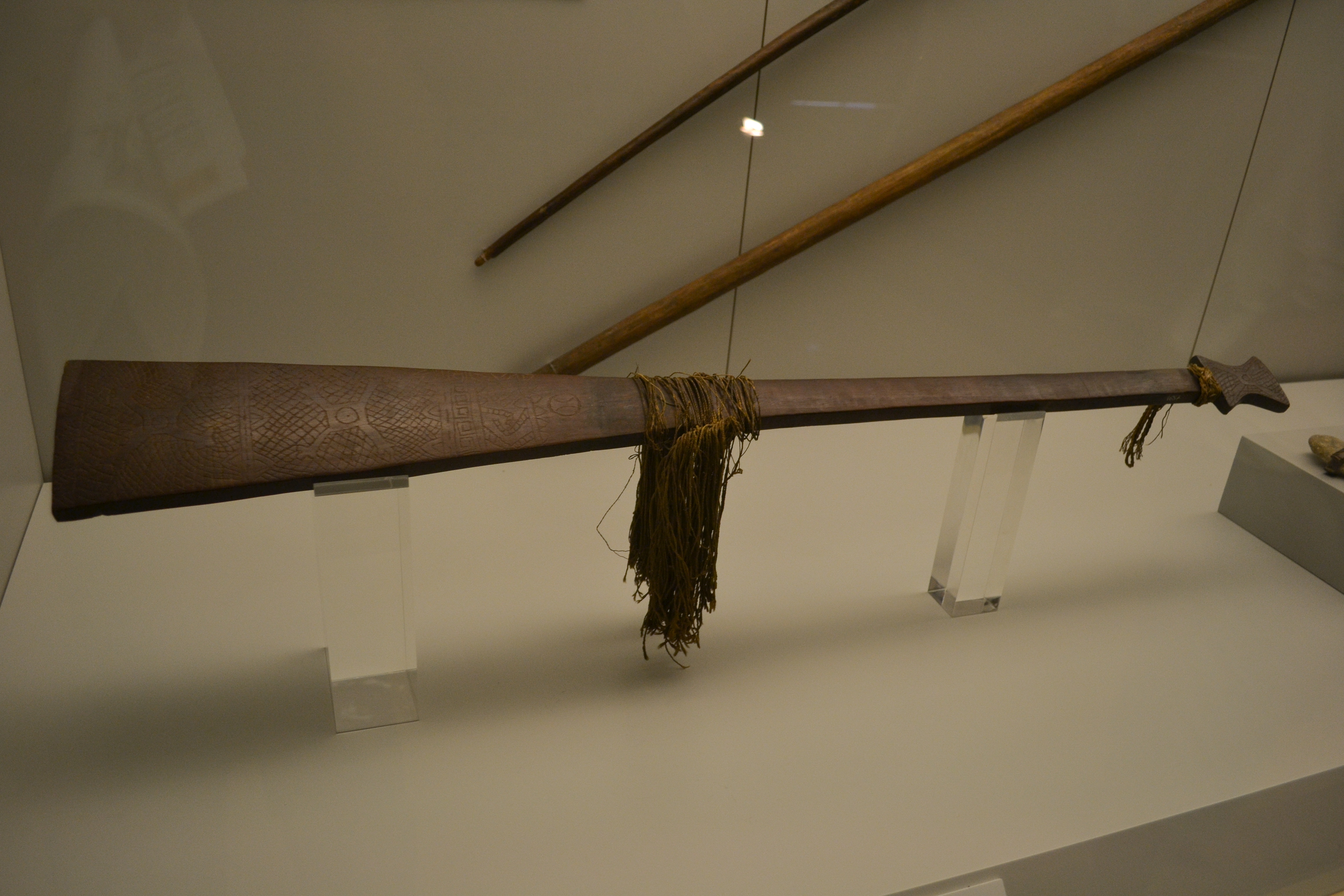 Macana del Amazonas. Material: Fibra vegetal y madera.Procedencia: Amazonas (Brasil). Longitud: 107 cm; anchura: 12,50 cm. Fleco: Longitud: 21 cm. Nº inv. 01657. Museo de América.